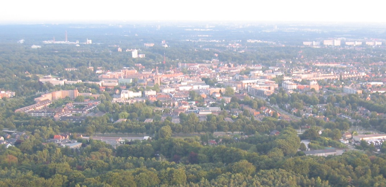 Picture taken by myself: (Ede vanaf de noordzijde) Ede, the Netherlands